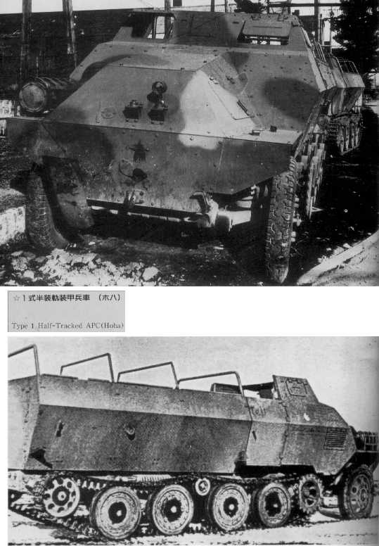 Japanese Type 1 Ho-Ha personnel carrier